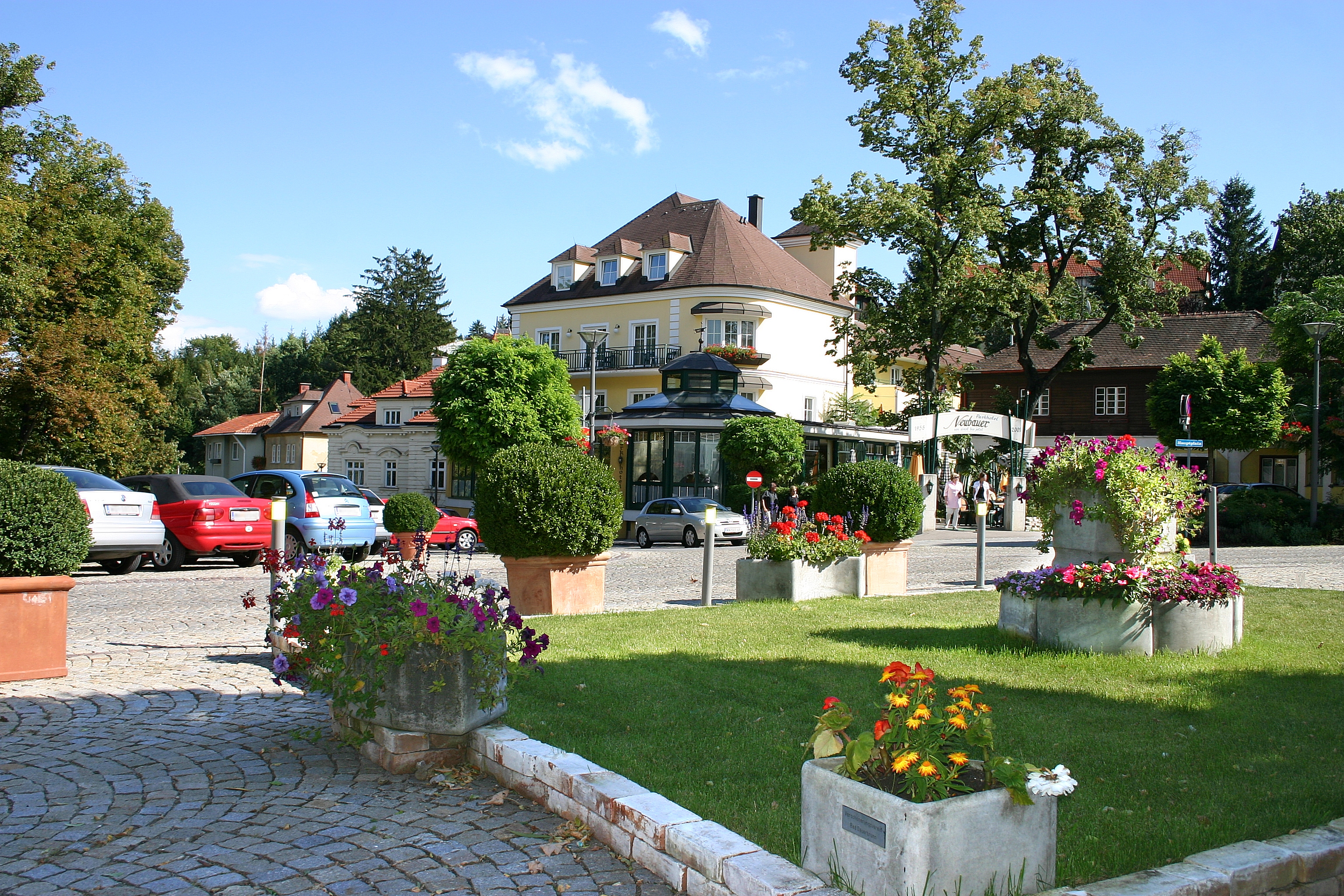 Bad Sauerbrunn Hauptplatz (Bild2)